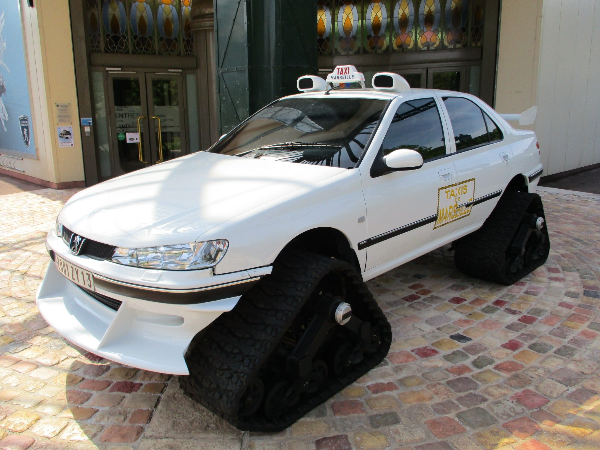 Musée de l'Aventure Peugeot-Sochaux / Peugeot 406 in Taxi 3